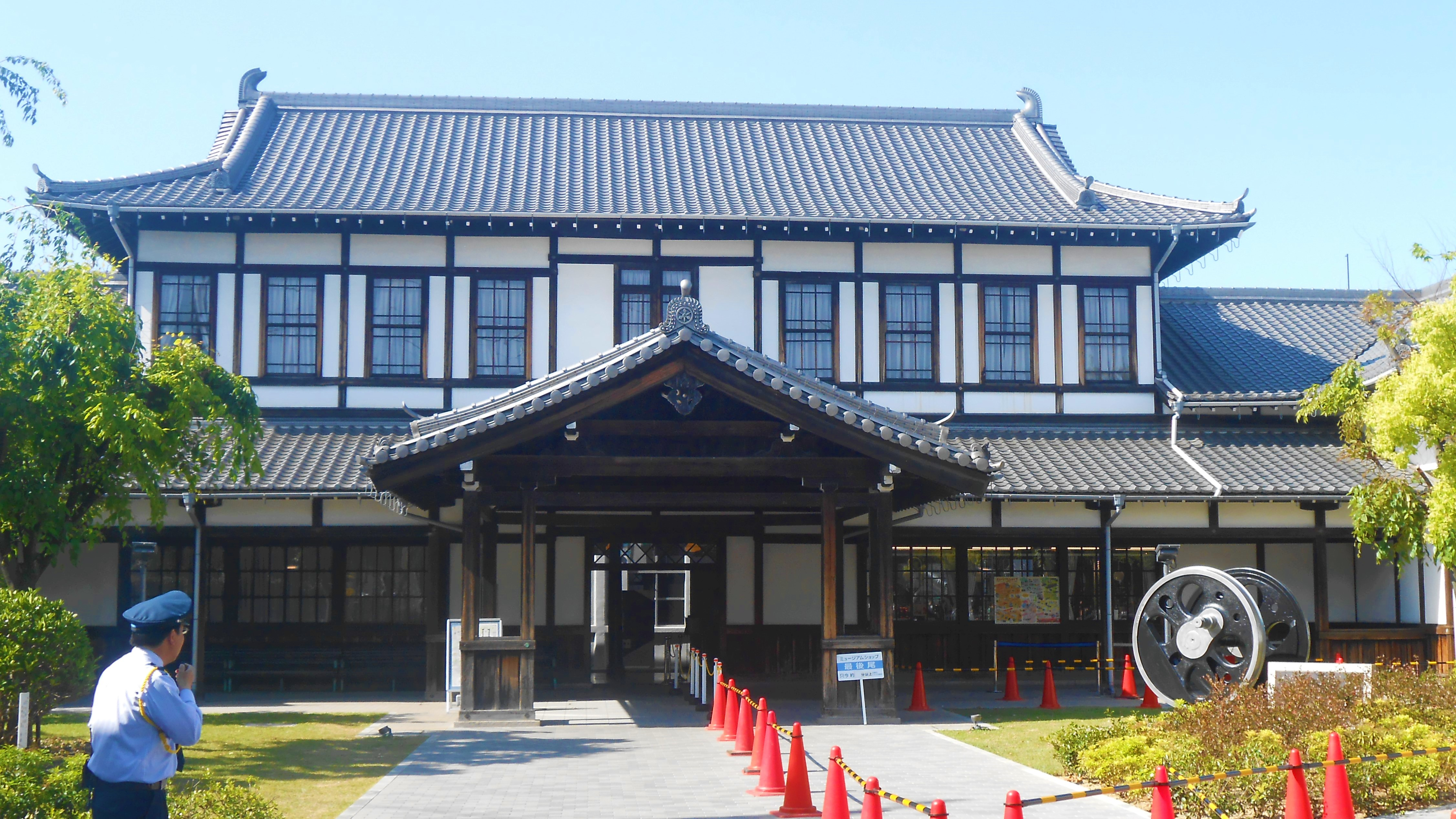 京都鉄道博物館に保存、売店として機能を持つ旧二条駅舎です